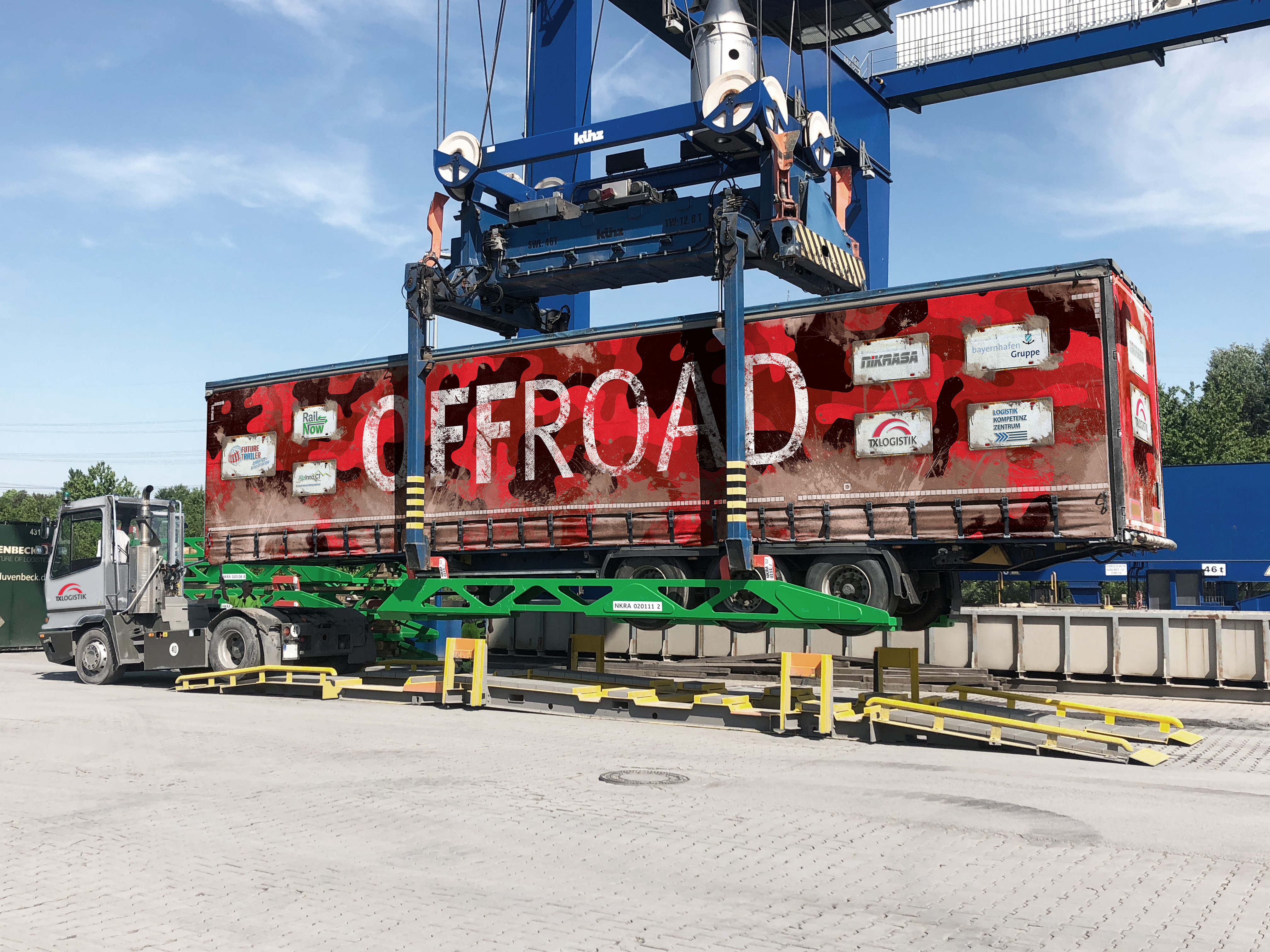 Zusenehn sind die beiden Komponeten des NiKRASA-Systems. - Positionierungshilfe (gelb verbleibt im Terminal) - Verladeadapter (grün geht mit auf die Reise) Sonst ändert sich nichts Umschlagprozess mit Reachstacker oder Kran)